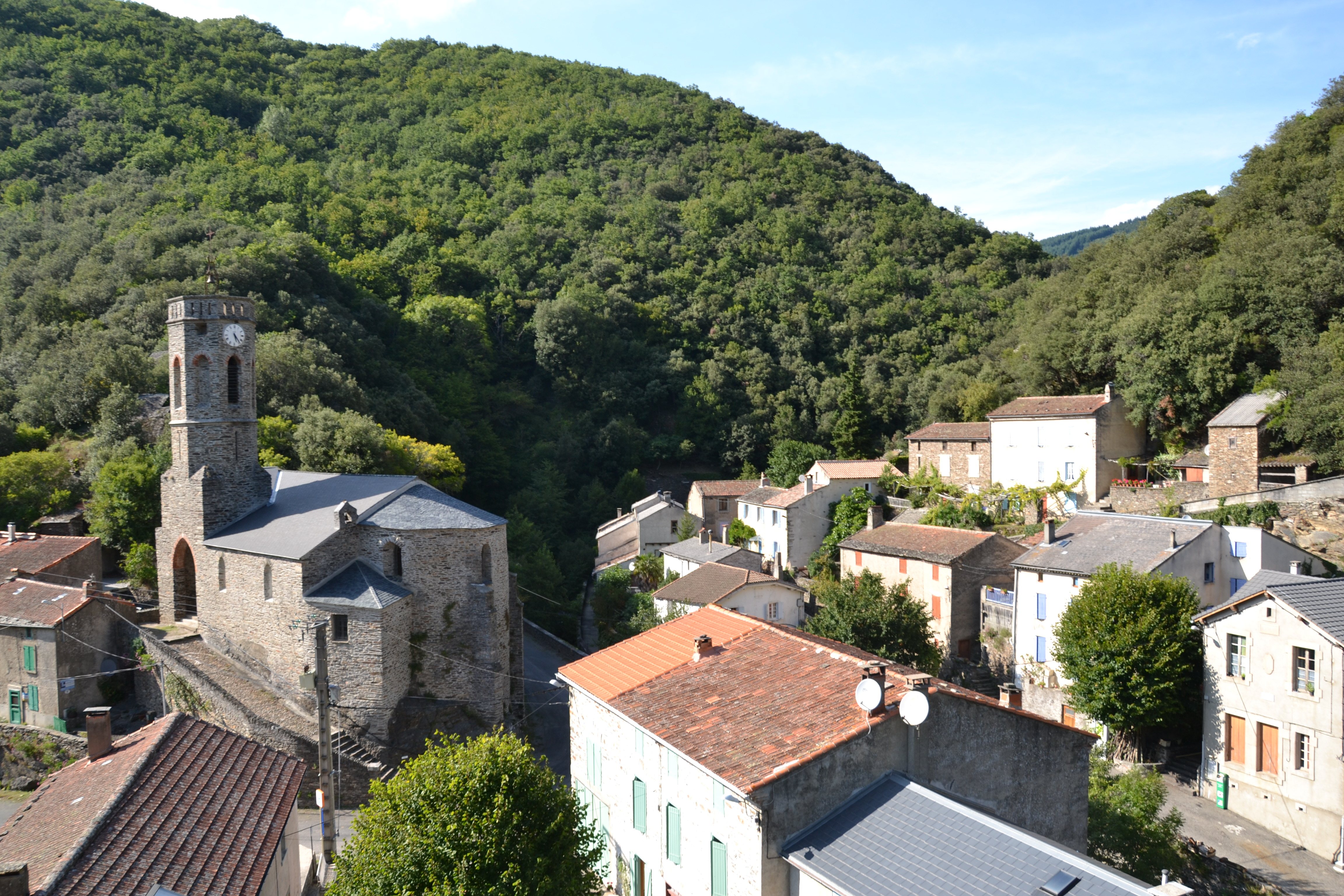 Vue générale du village